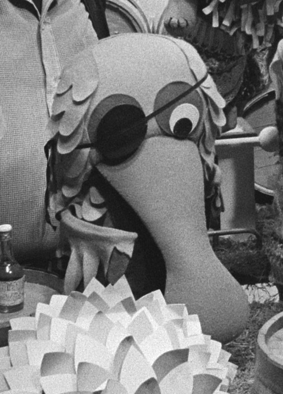 Collectie / Archief : Fotocollectie Anefo Reportage / Serie : [ onbekend ] Beschrijving : Persconferentie i.v.m. Fabeltjeskrant voor volwasssenen; Harry Lepelaar uit De Fabeltjeskrant Datum : 2 februari 1979 Trefwoorden : persconferenties Fotograaf : Dijk, Hans van / Anefo Auteursrechthebbende : Nationaal Archief Materiaalsoort : Negatief (zwart/wit) Nummer archiefinventaris : bekijk toegang 2.24.01.05 Bestanddeelnummer : 930-1013